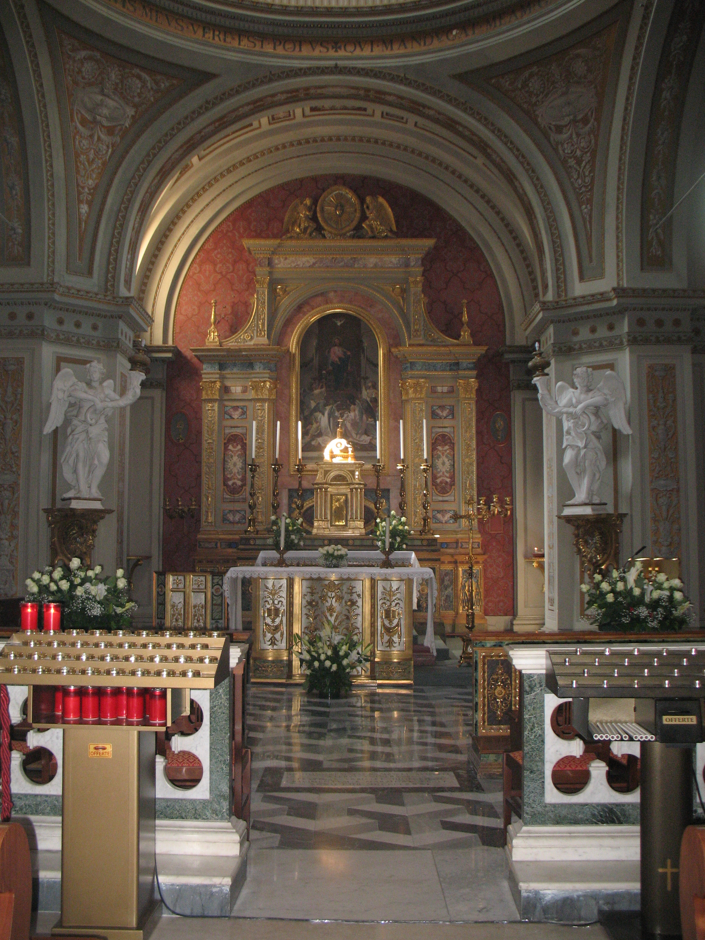 Cappella dedicata al Santissimo Sacramento del Duomo di Chieti voluta nel XIX secolo dall’arcivescovo Ruffo Scilla